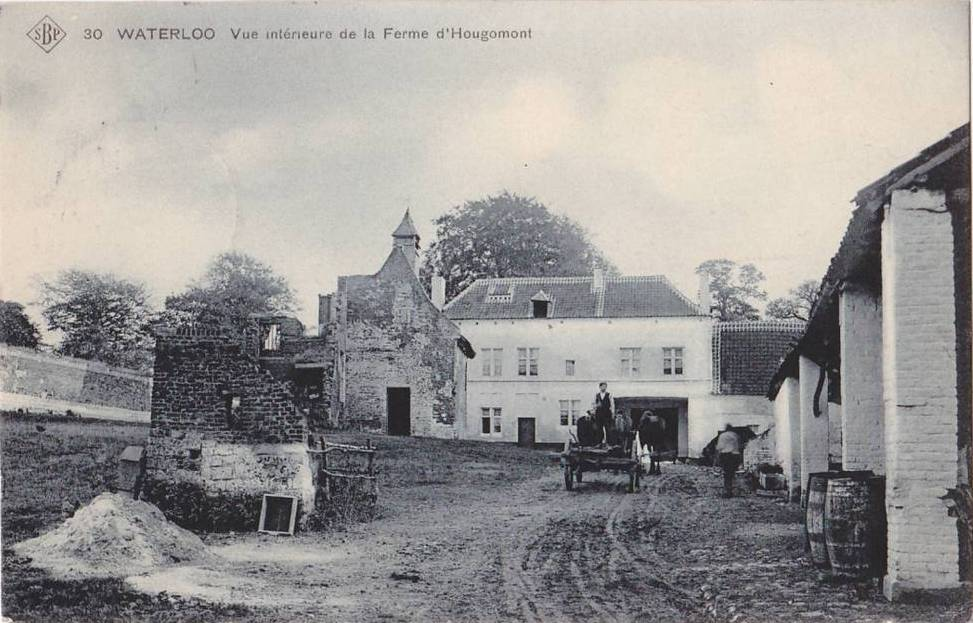 La ferme de Hougoumont représentée sur une carte postale de 1915. Vue sur la cour intérieure. Avec charette et animation